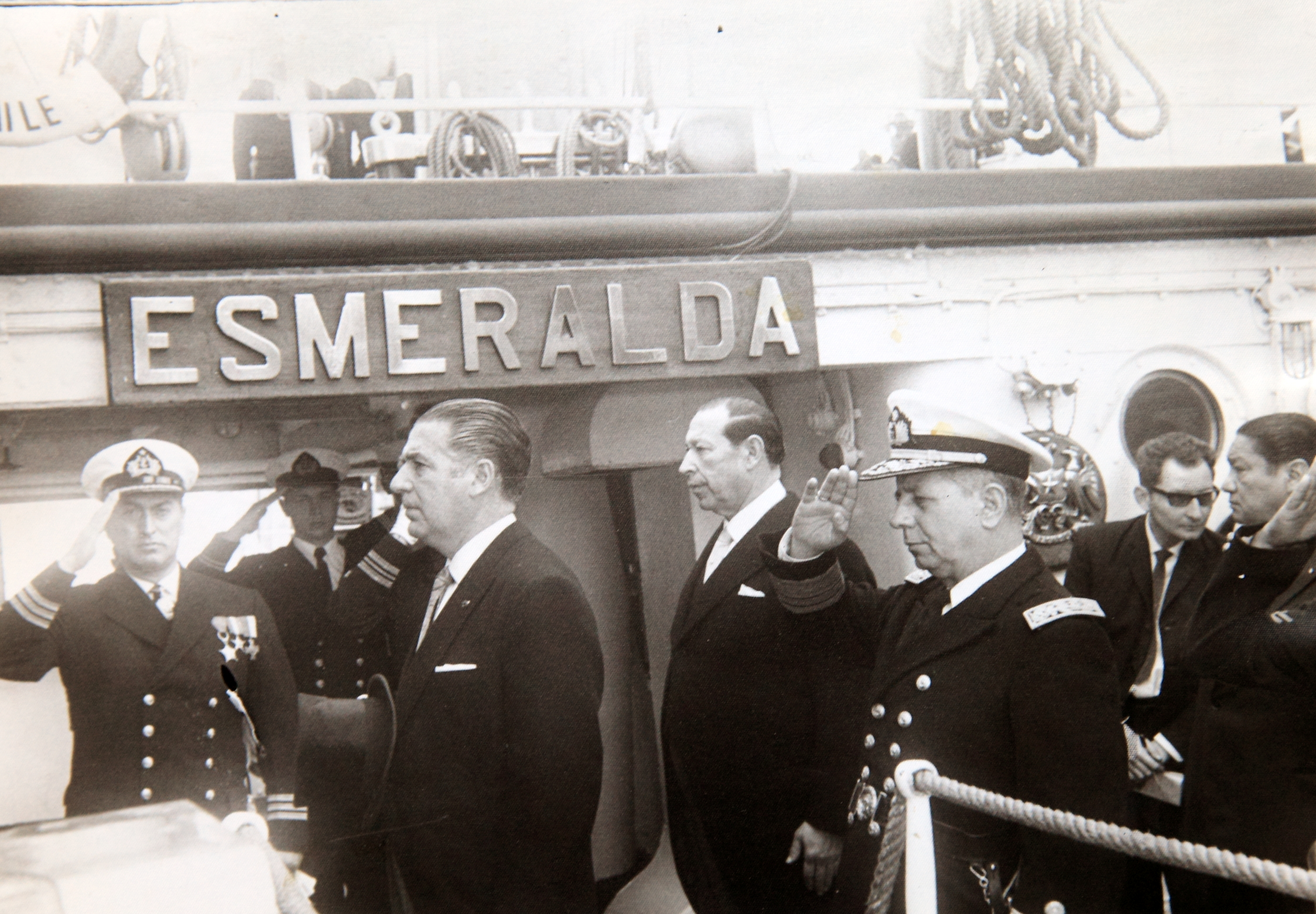 Hugo Zepeda Barrios, Senador chileno: junto a Fernando Belaúnde Terry, Presidente del Perú.